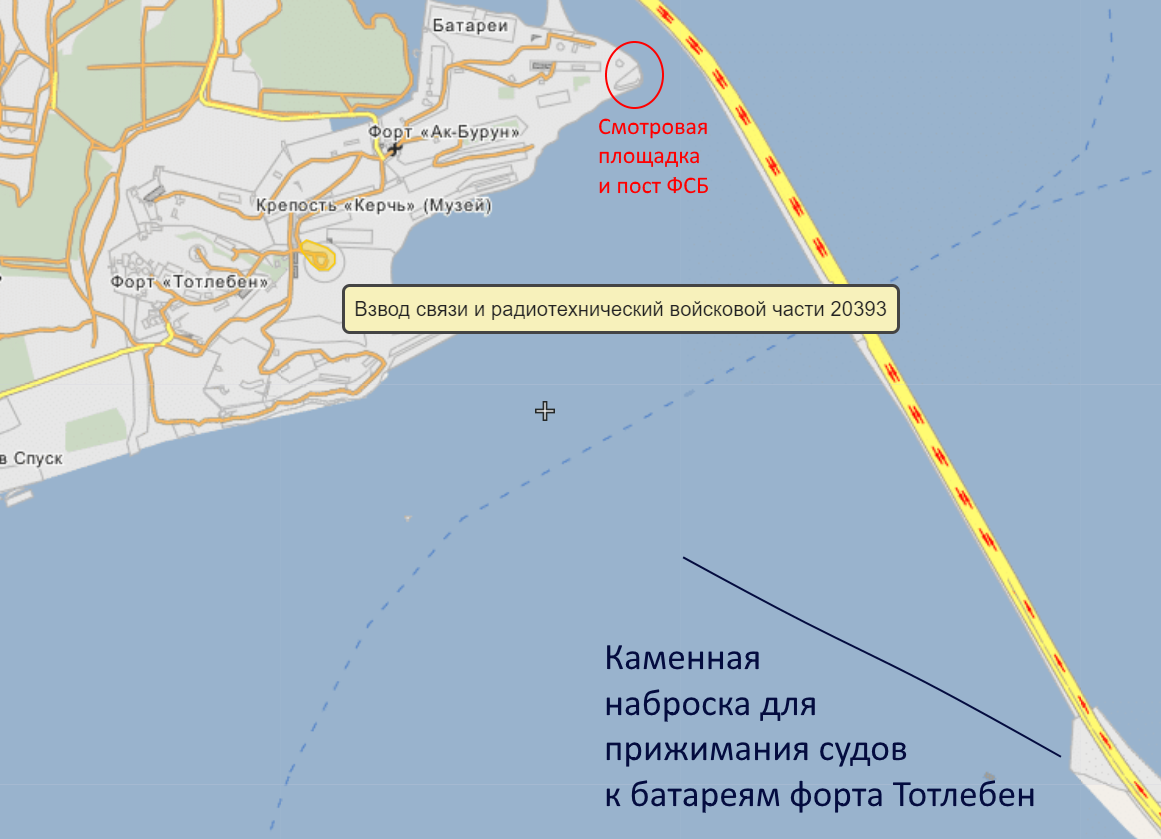 Позиции РЛС ПВО и ВМФ РФ у Керченского моста